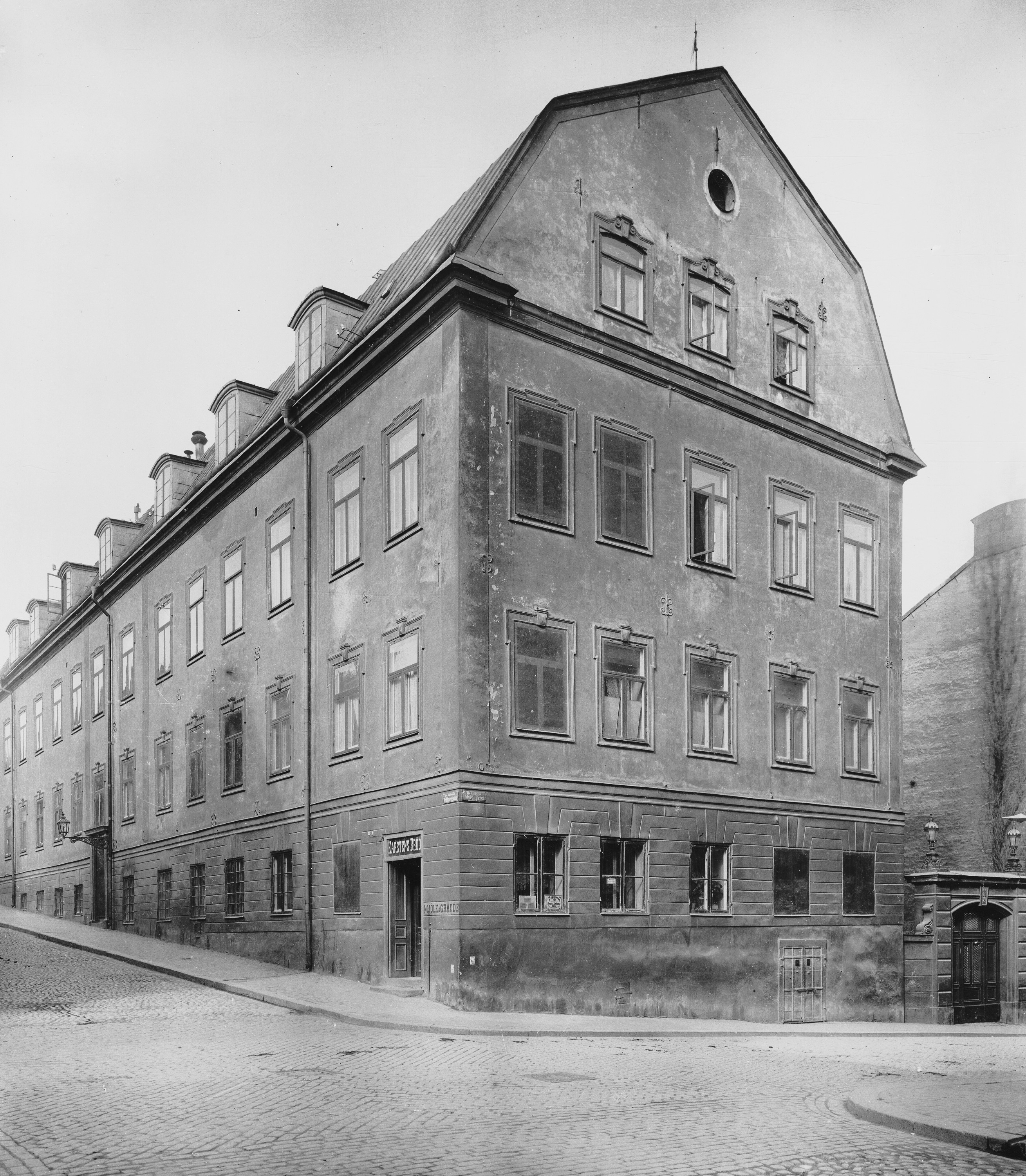 Palinska huset hörnet Riddargatan - Nybrogatan (revs 1910)